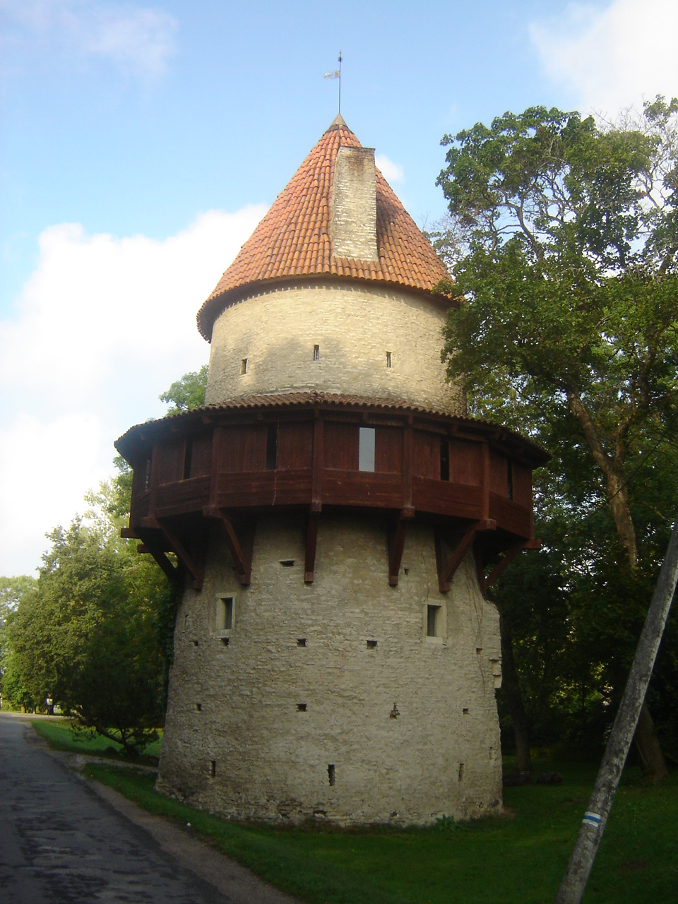 Kiiu tornlinnus ehk Mungatorn.